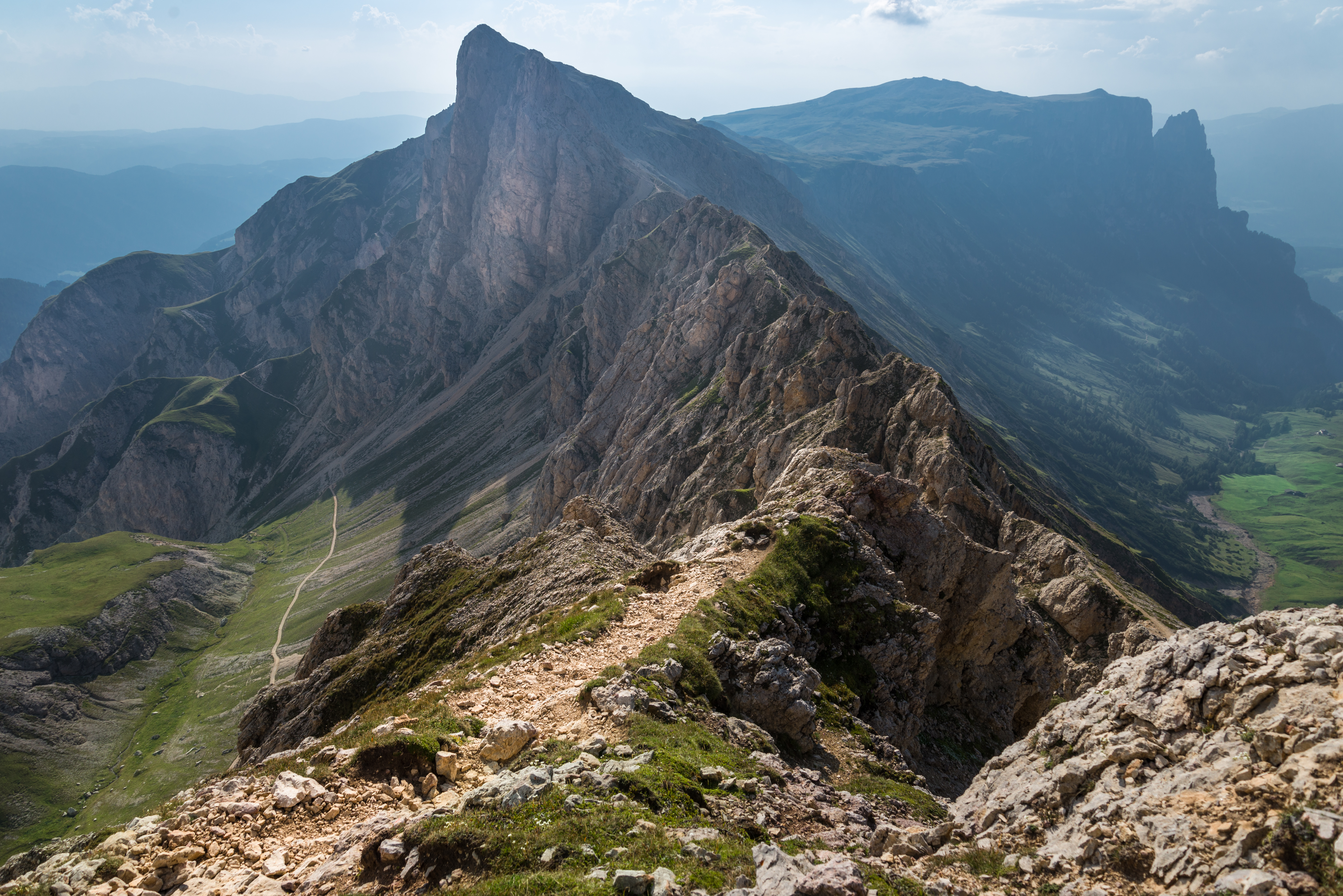 Parco naturale dello Sciliar-Catinaccio, Cima di Terrarossa